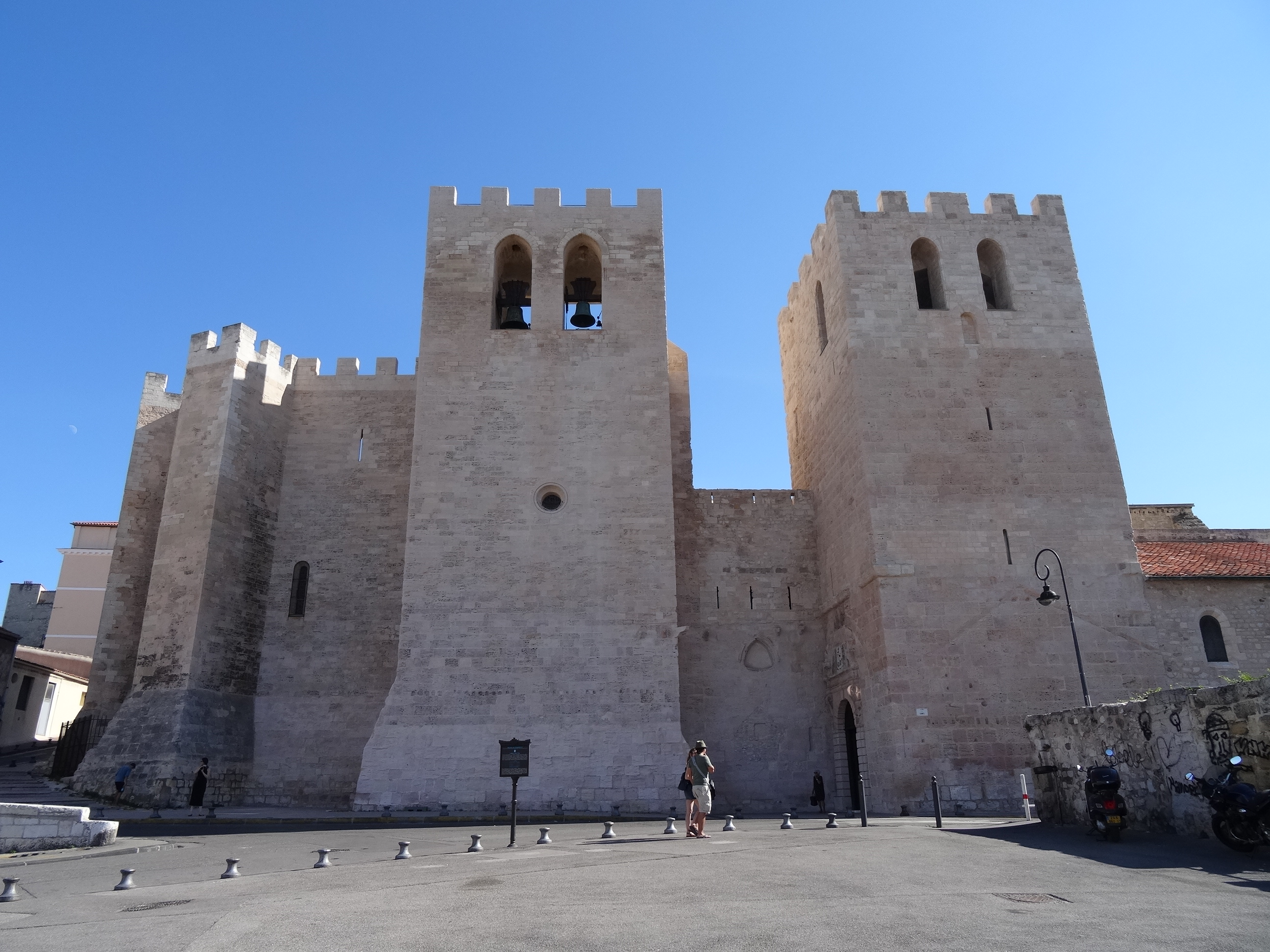 Abbaye Saint Victor à Marseille,. (Classée)